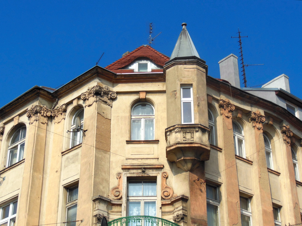 Kamienica przy ul. Dworcowej 41 w Bydgoszczy, róg ul. Marcinkowskiego